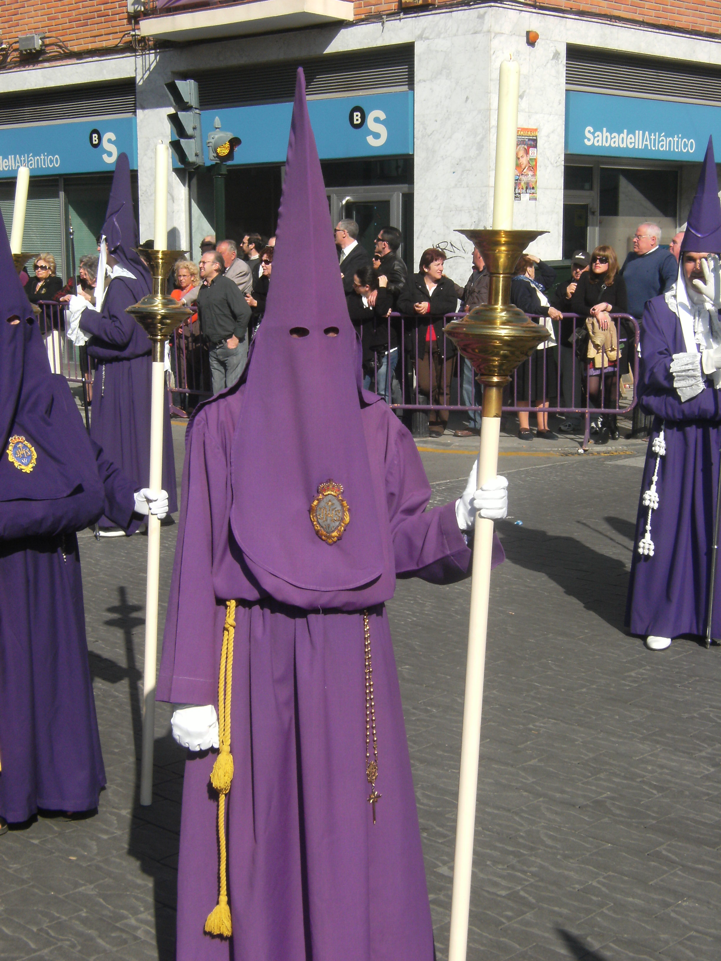 Nazareno penitente de la Hermandad de la Dolorosa, de la Cofradía de Jesús Nazareno (Murcia, Región de Murcia, España)